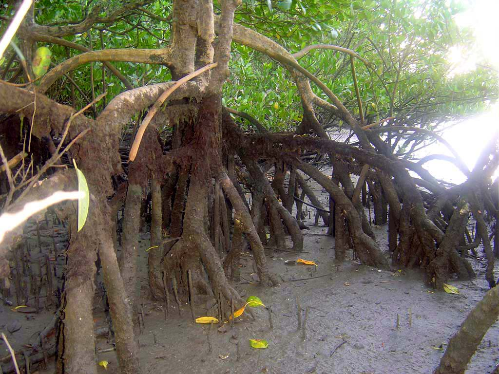 Rizofora, espécie adaptada a vida no mangue